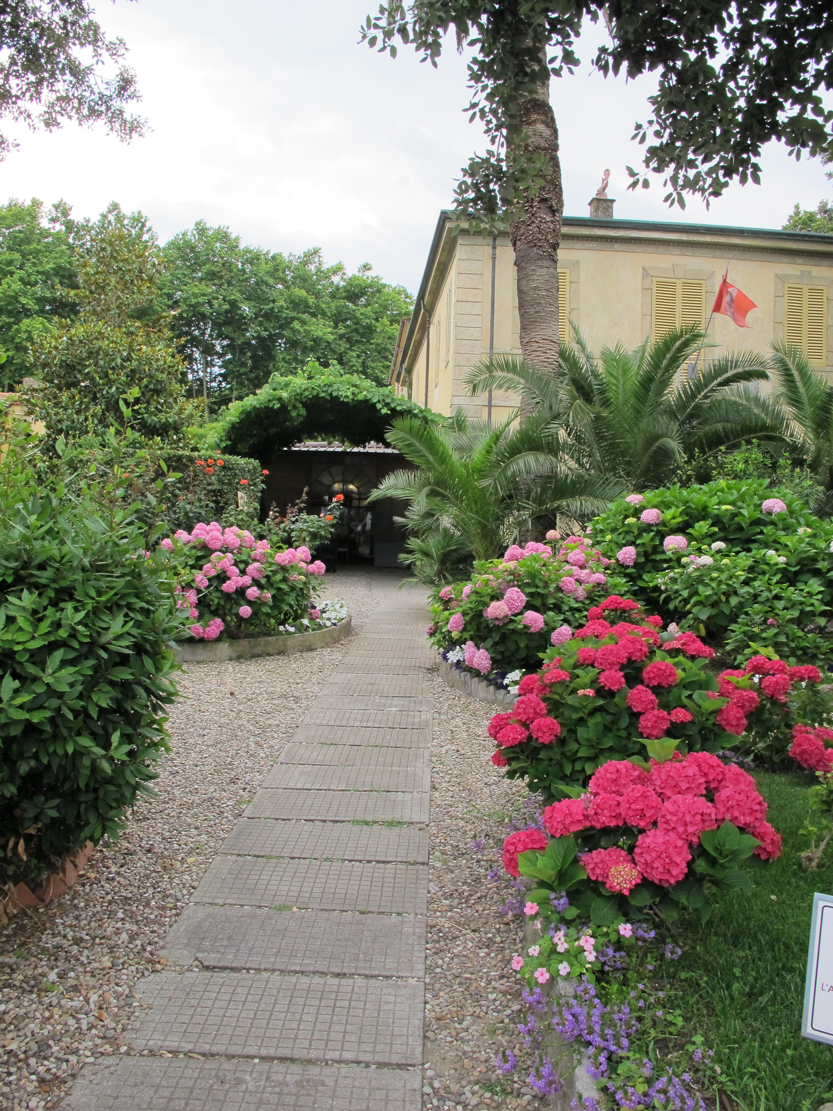 Villa puccini di torre del lago